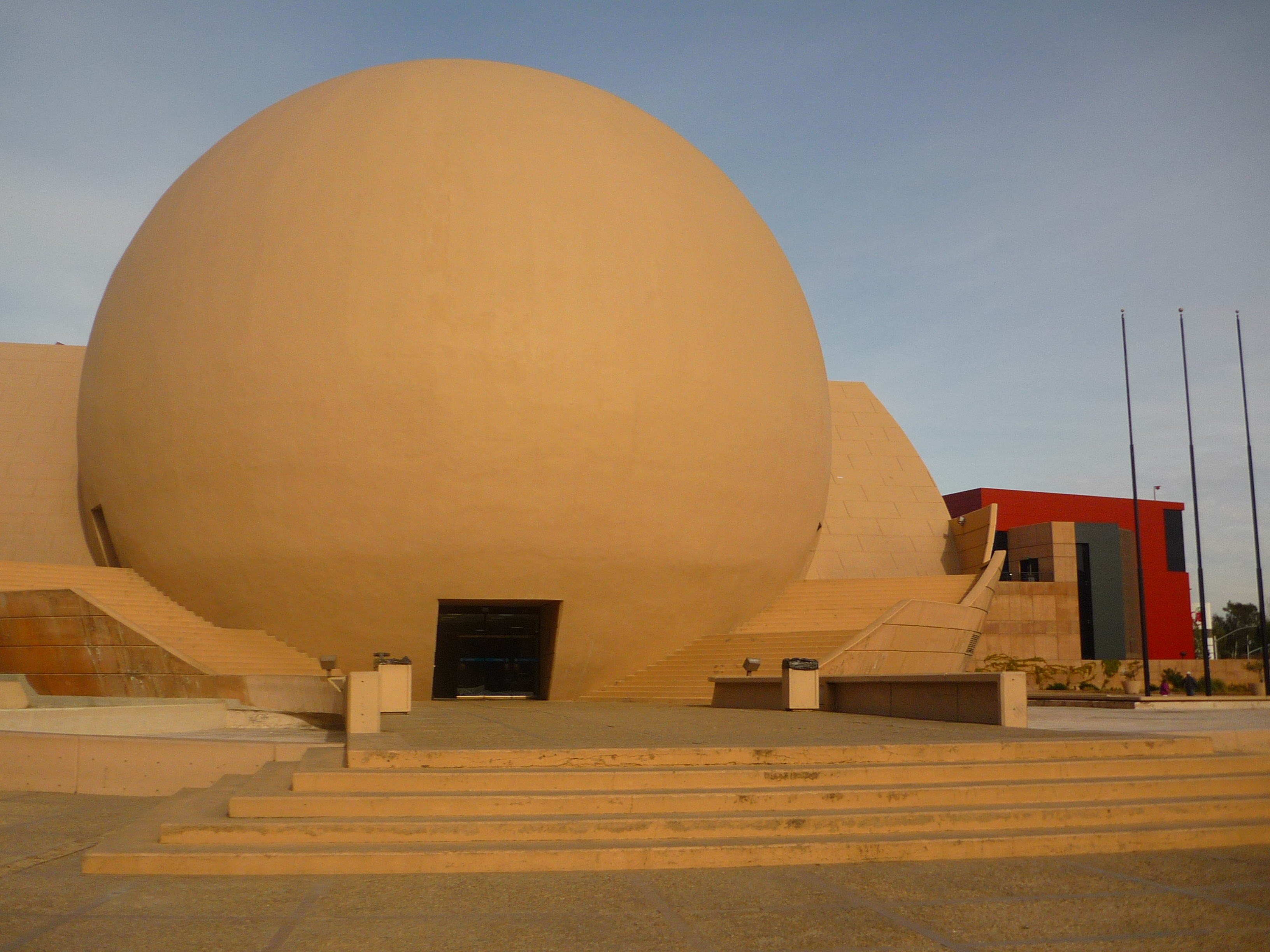 Cine Omnimax